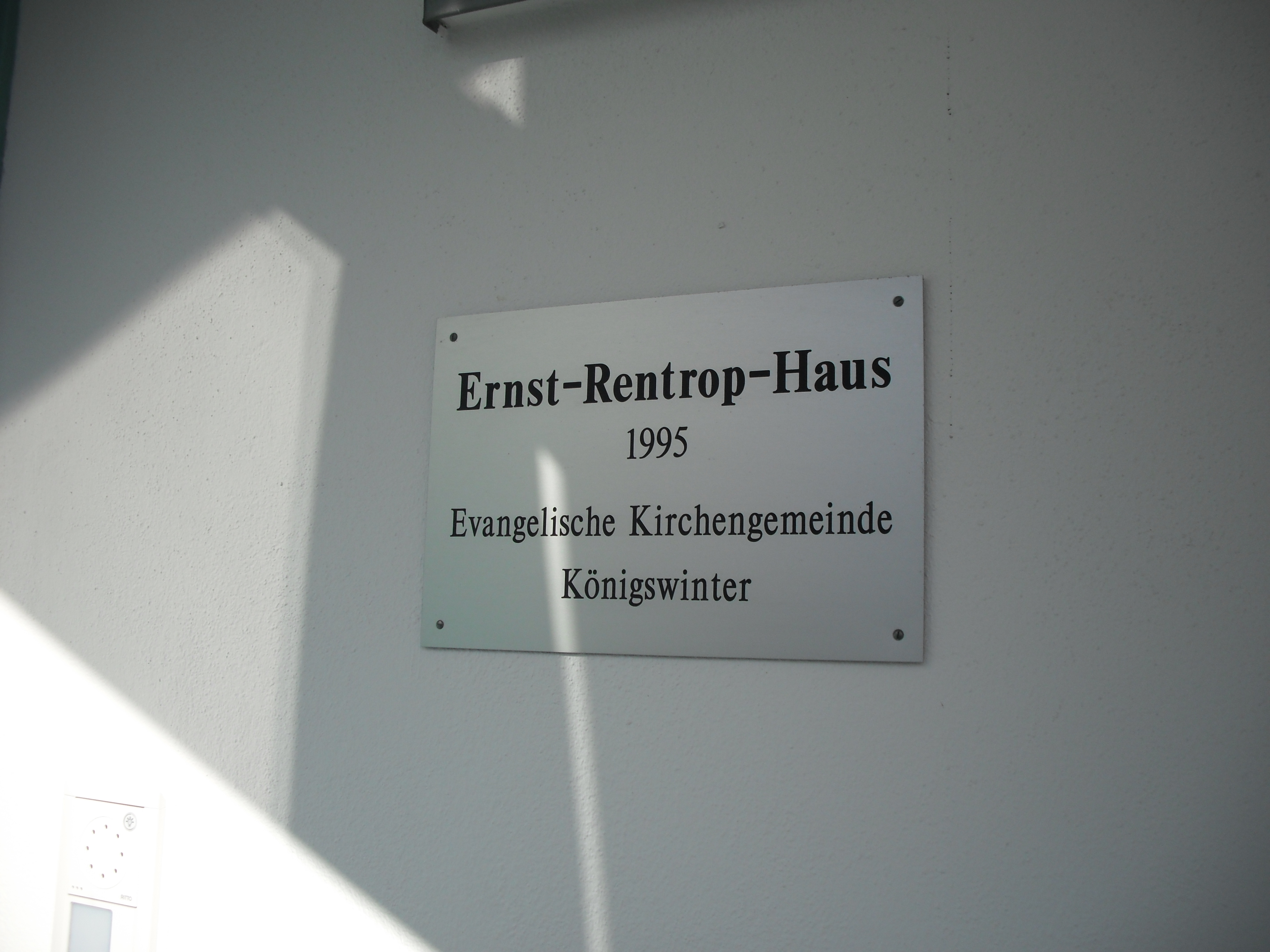 Ernst-Rentrop-Haus, Grabenstraße 22, Königswinter